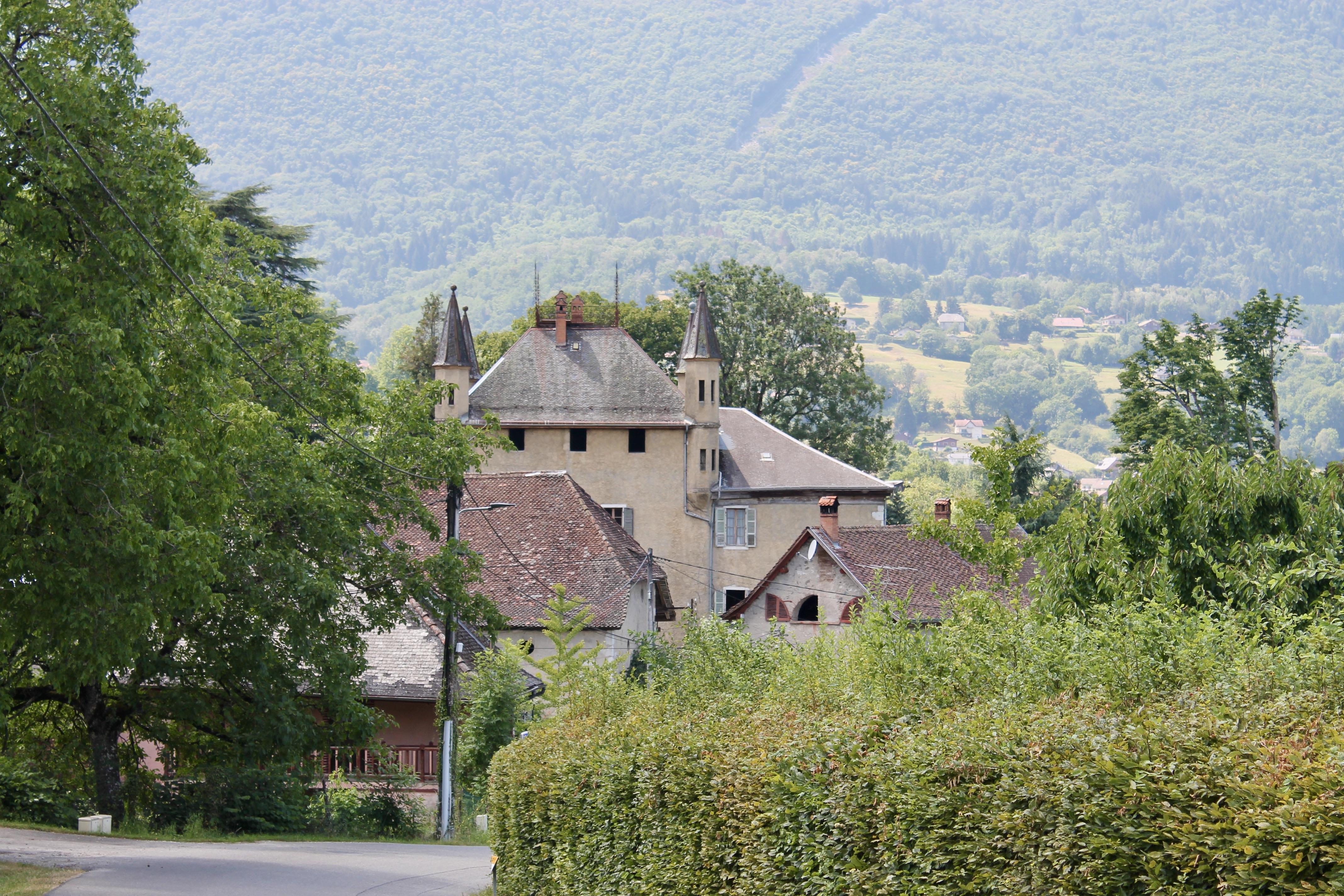 Vue du château de Villard-Chabod (XIIIe siècle remanié au XVIIIe siècle). Edifice carré, avec des échauguettes à chaque angle.